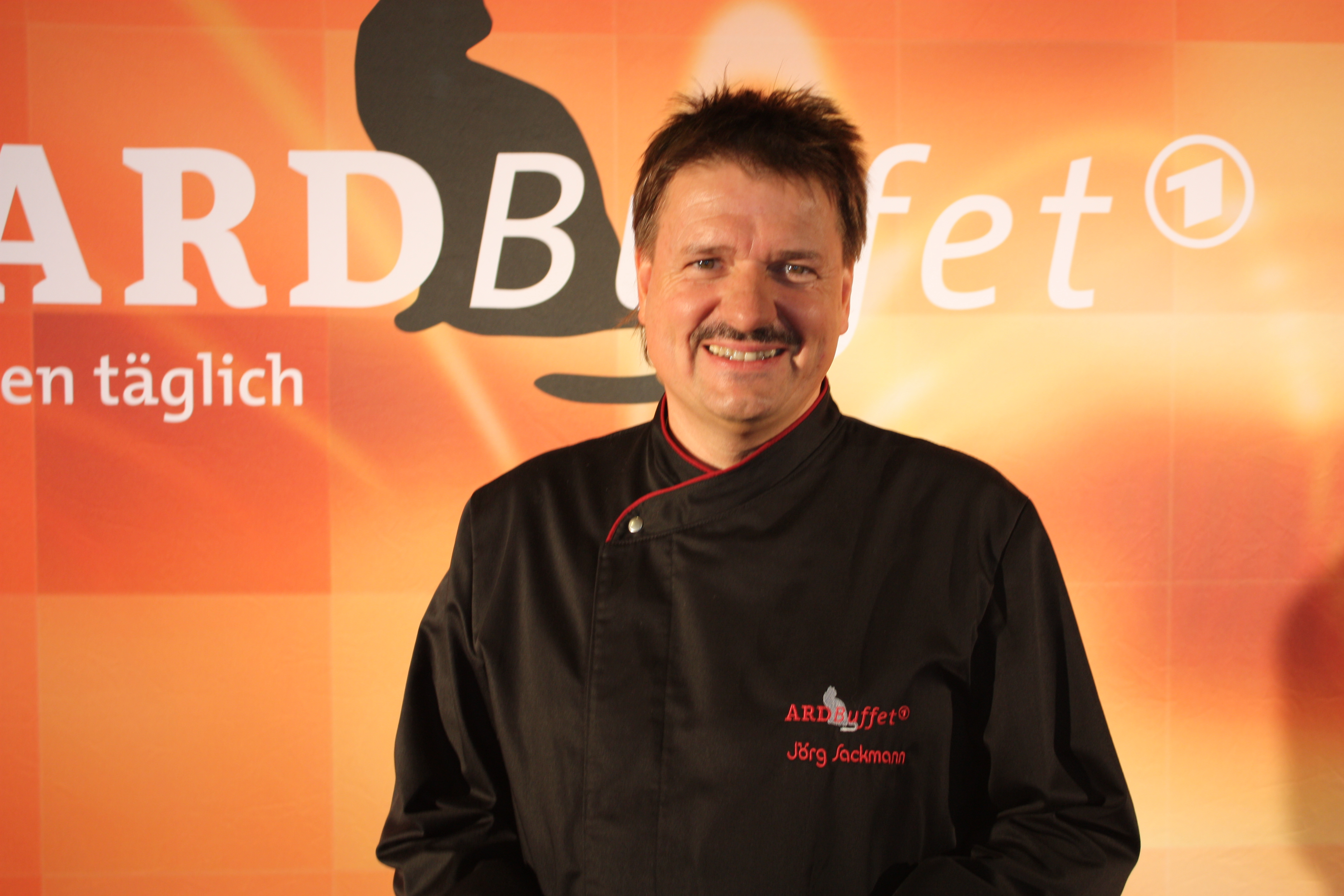 Internationale Funkausstellung 2012 , ARD-Buffet